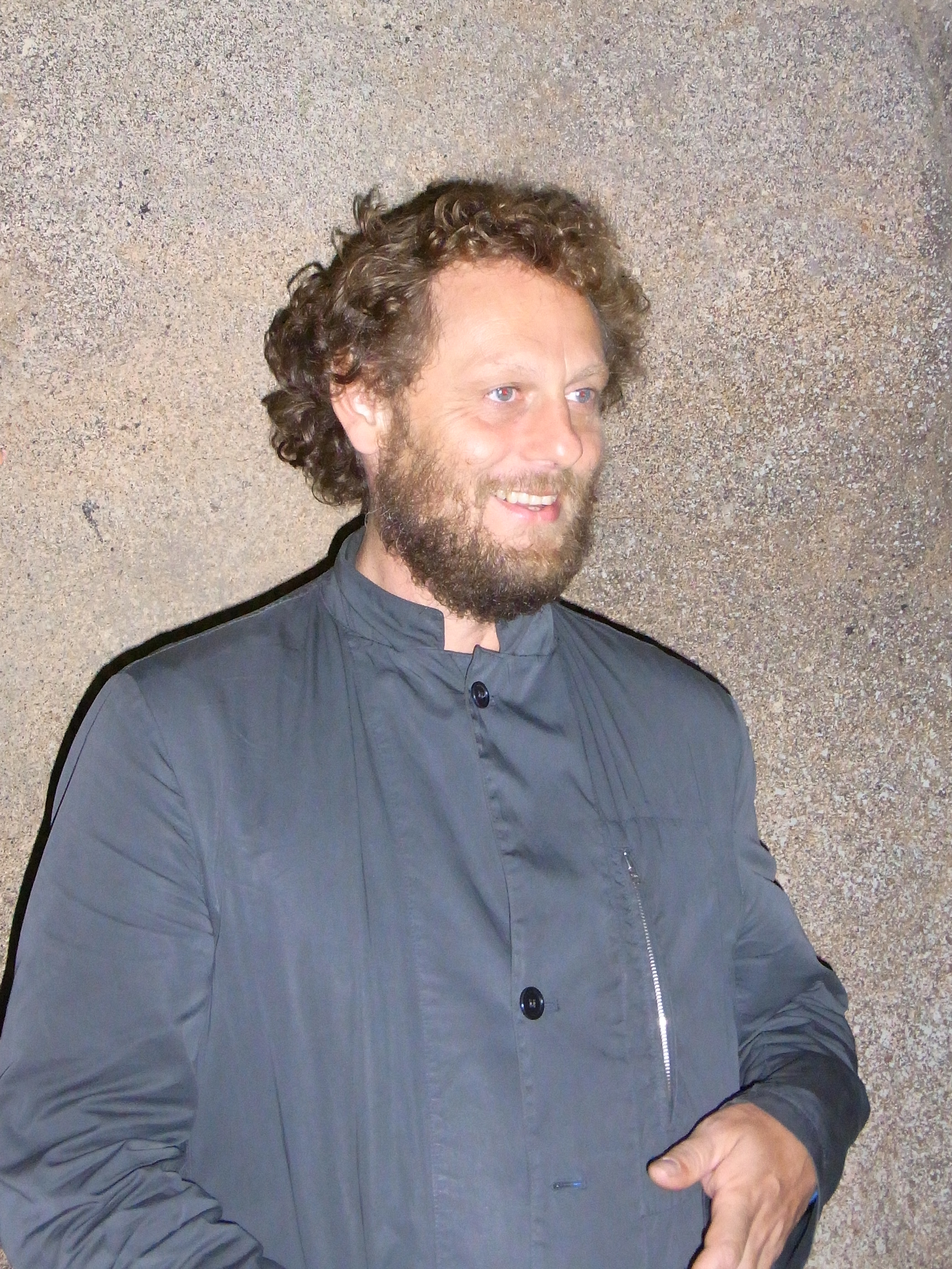 Finisage der Emscherkunst.2010 Olaf Nicolai. Monument for a Forgotten Future